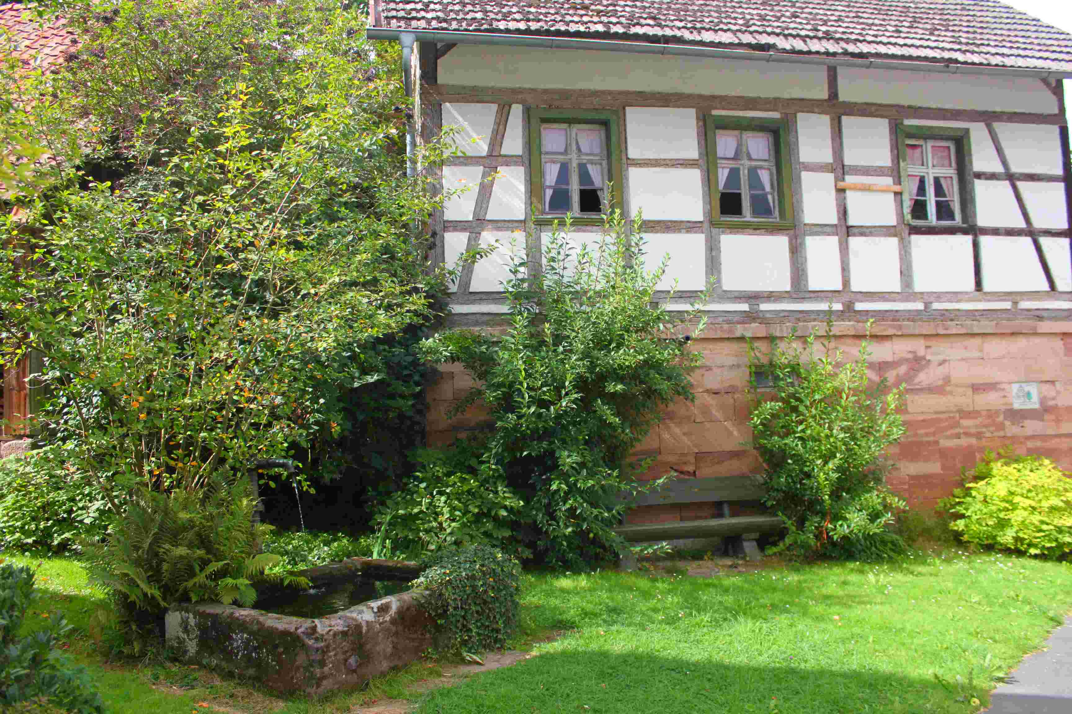 Brunnen im Ködnitzer Ortsteil Fölschnitz